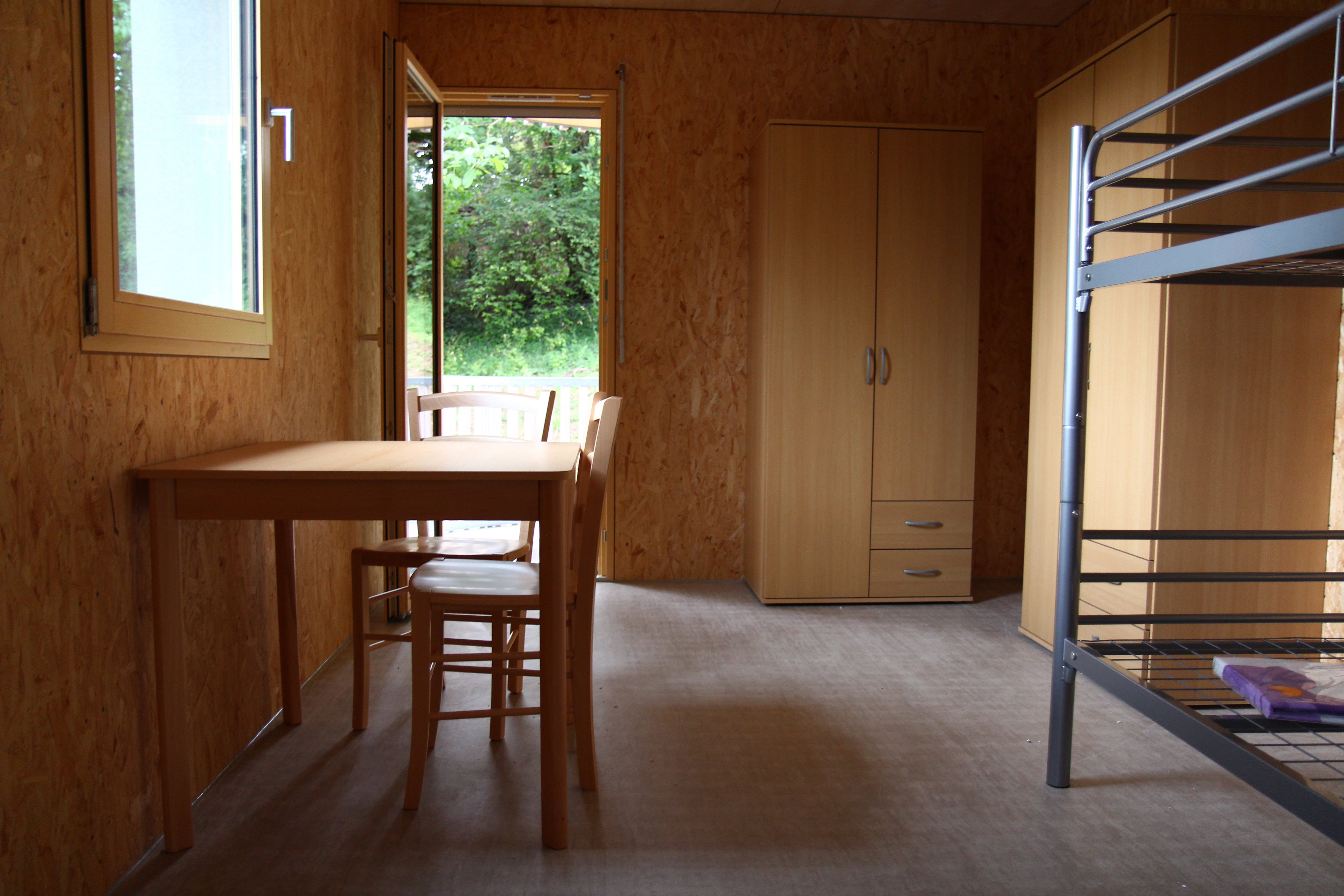 Auch die Innenräume des Hoffnungshauses zeichnen sich durch den Baustoff Holz aus und sorgt so für Natürlichkeit und Ursprünglichkeit.